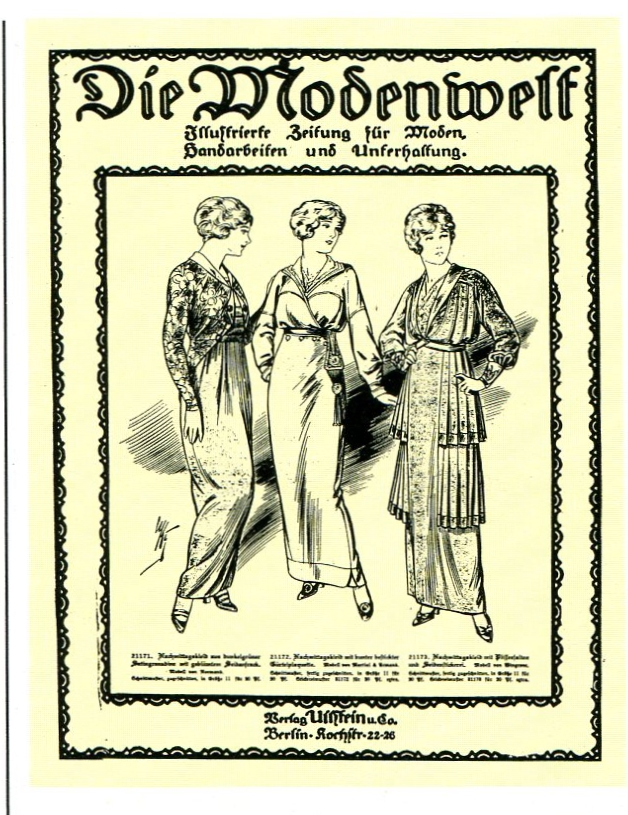 Titelblatt der Zeitschrift Die Modewelt 1911